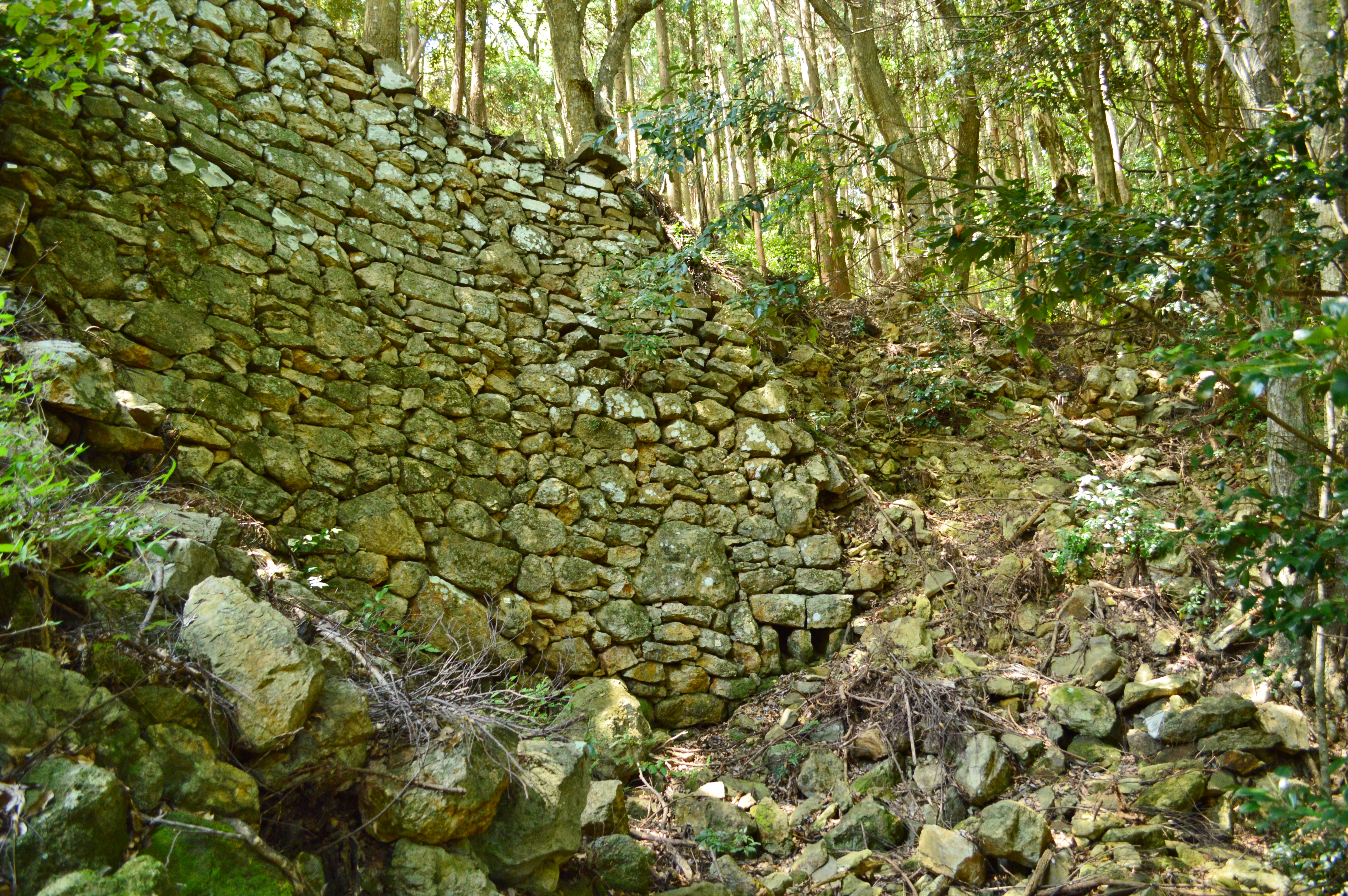 金田城 一ノ城戸